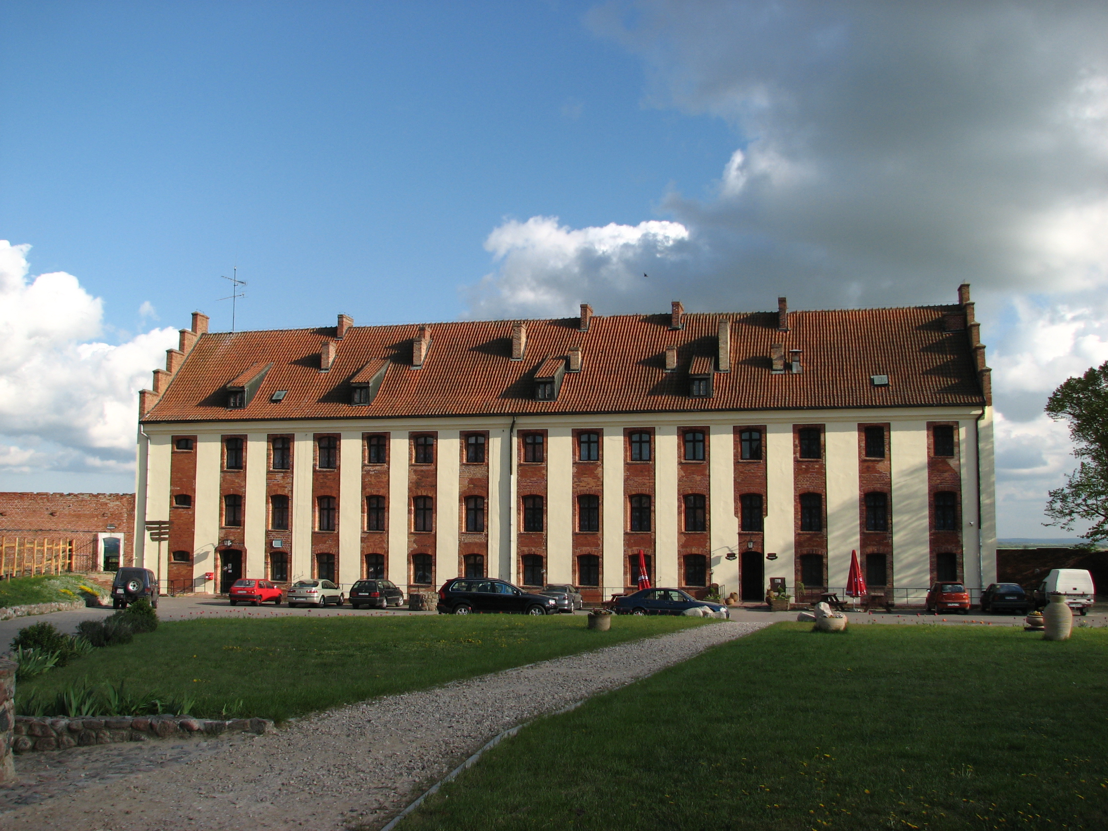 Pałac Marysieńki w Gniewie